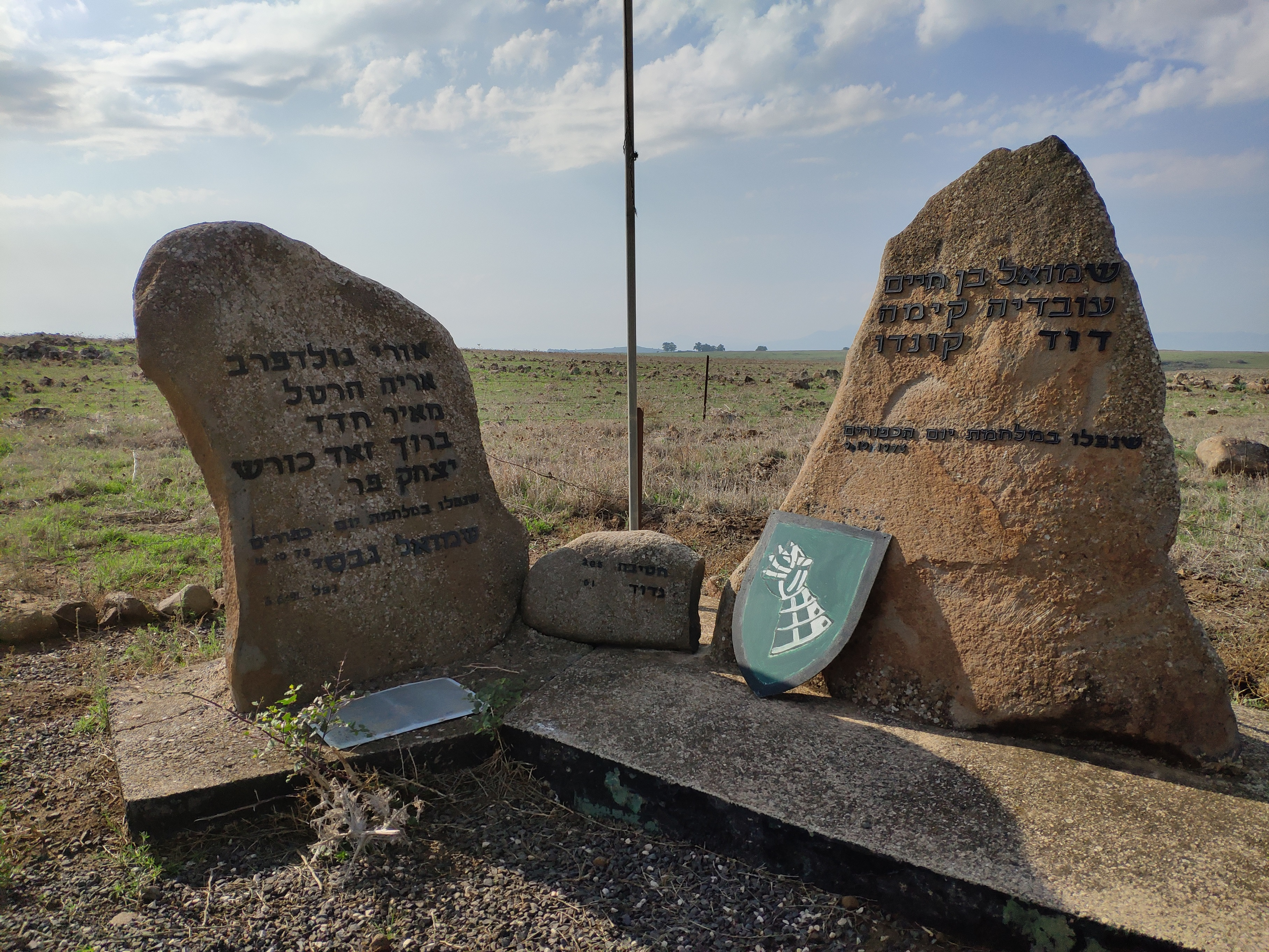 אנדרטה לזכר חללי גדוד 61 מחטיבה 205 במלחמת יום הכיפורים, על ציר המפלים (כביש 808).